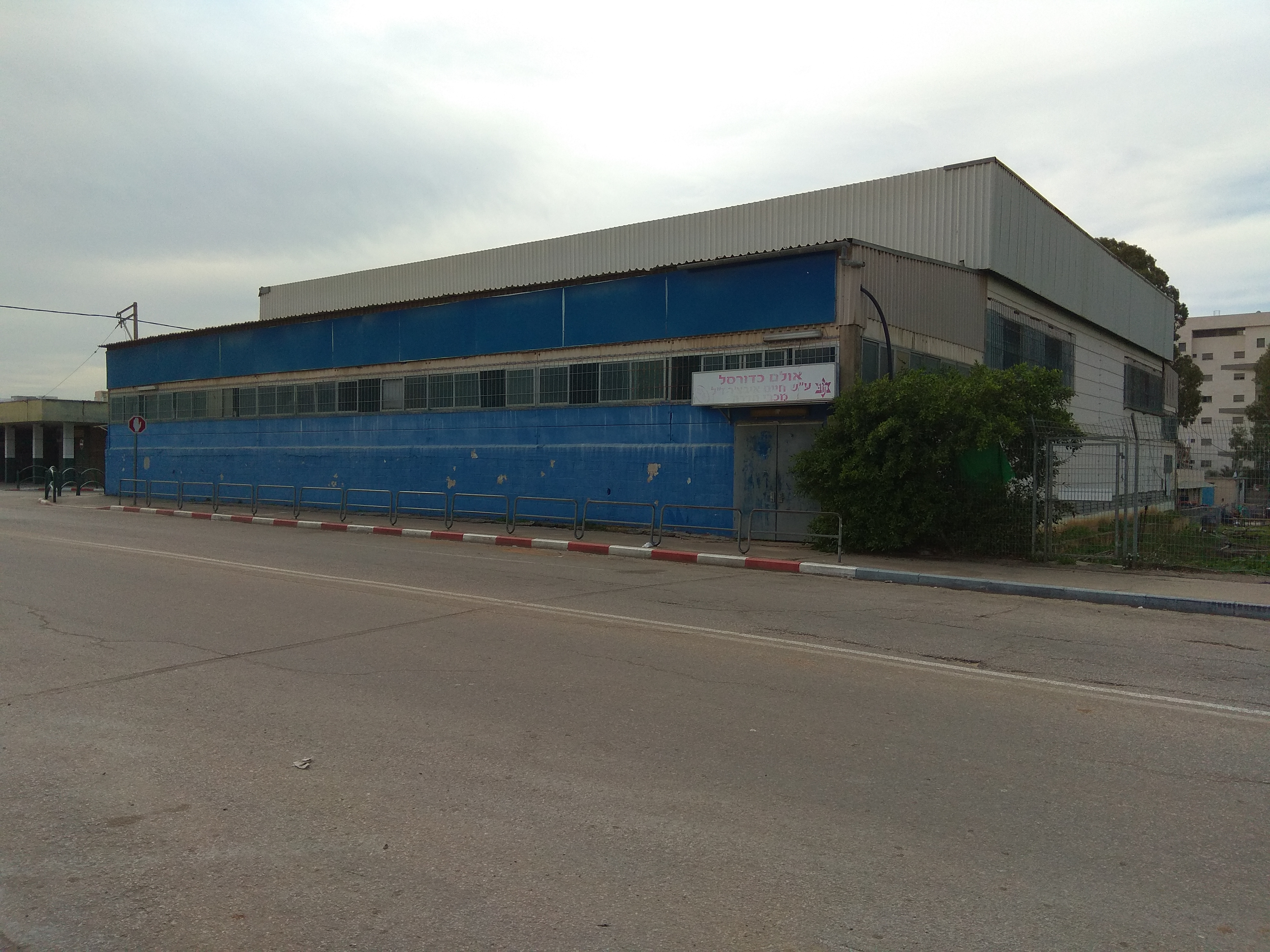 אולם מכבי חדרה ע"ש חיים איבצ'ר